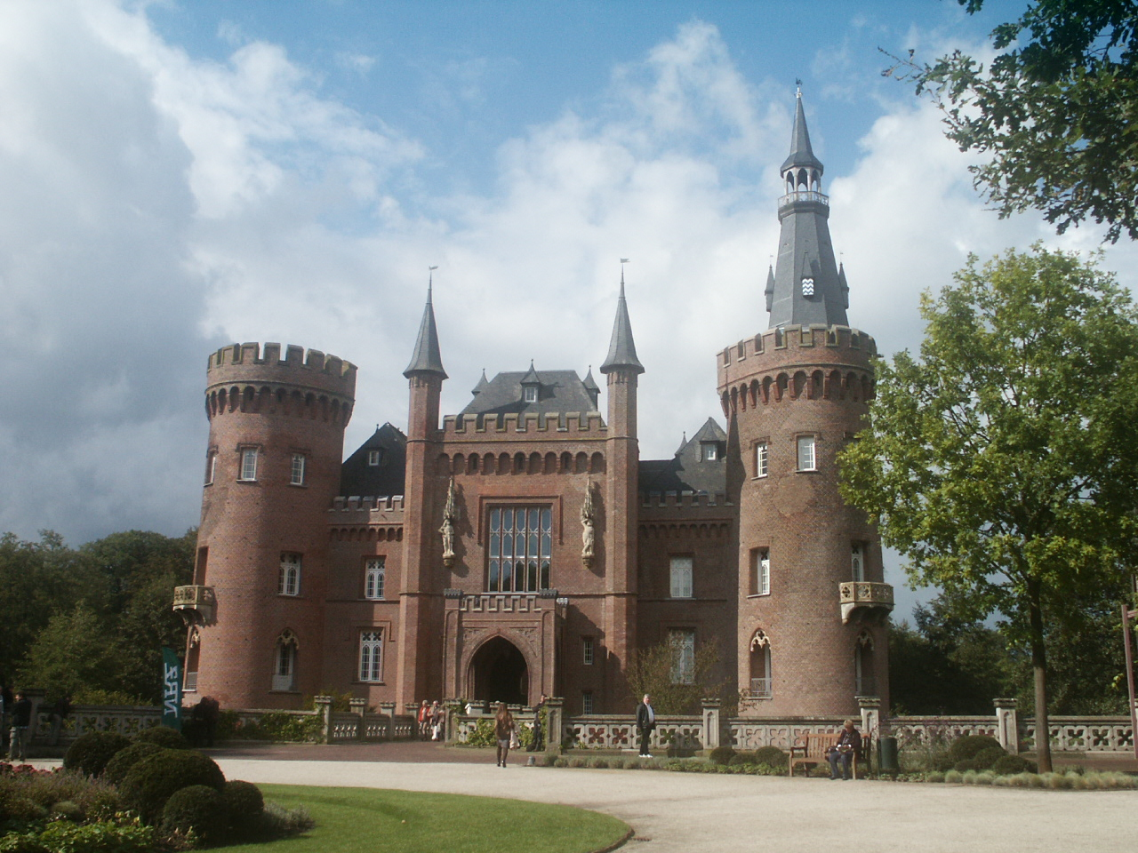 Museum Schloss Moyland, front aanzicht in 2011